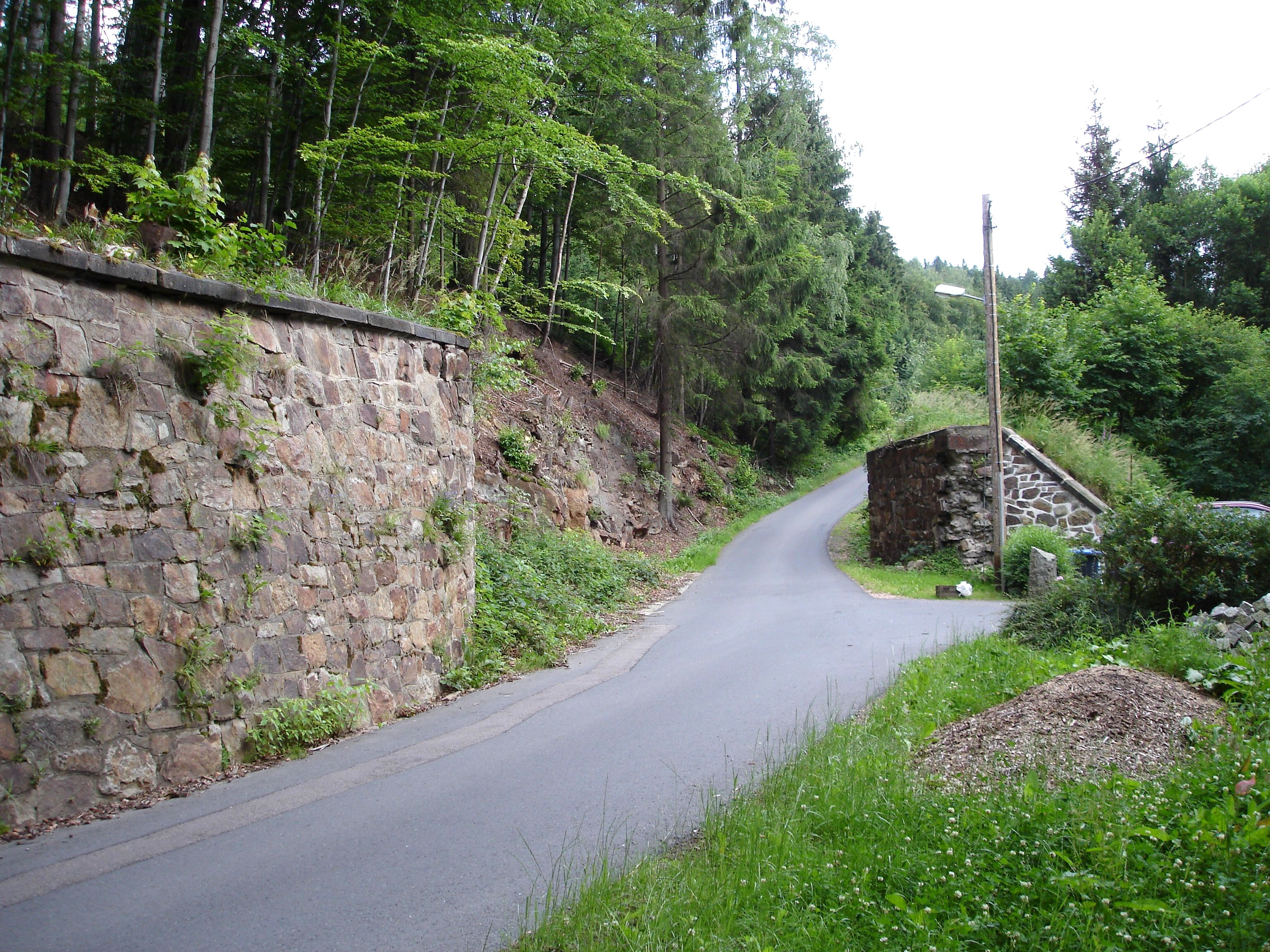 Pöbeltalbahn, Brückenwiderlager in Niederpöbel, Alte Böhmische Straße